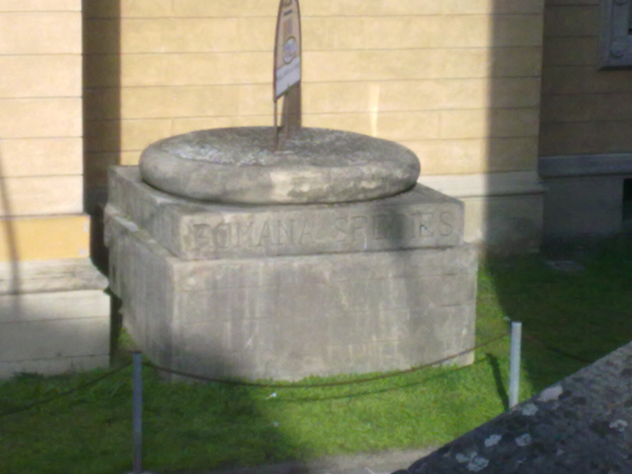 Una delle due basi di colonne, un tempo sovrastate da una pigna che incorniciavano la facciata del Palazzo dei Sindacati, alla base delle quali è incisa la frase Romana Species.